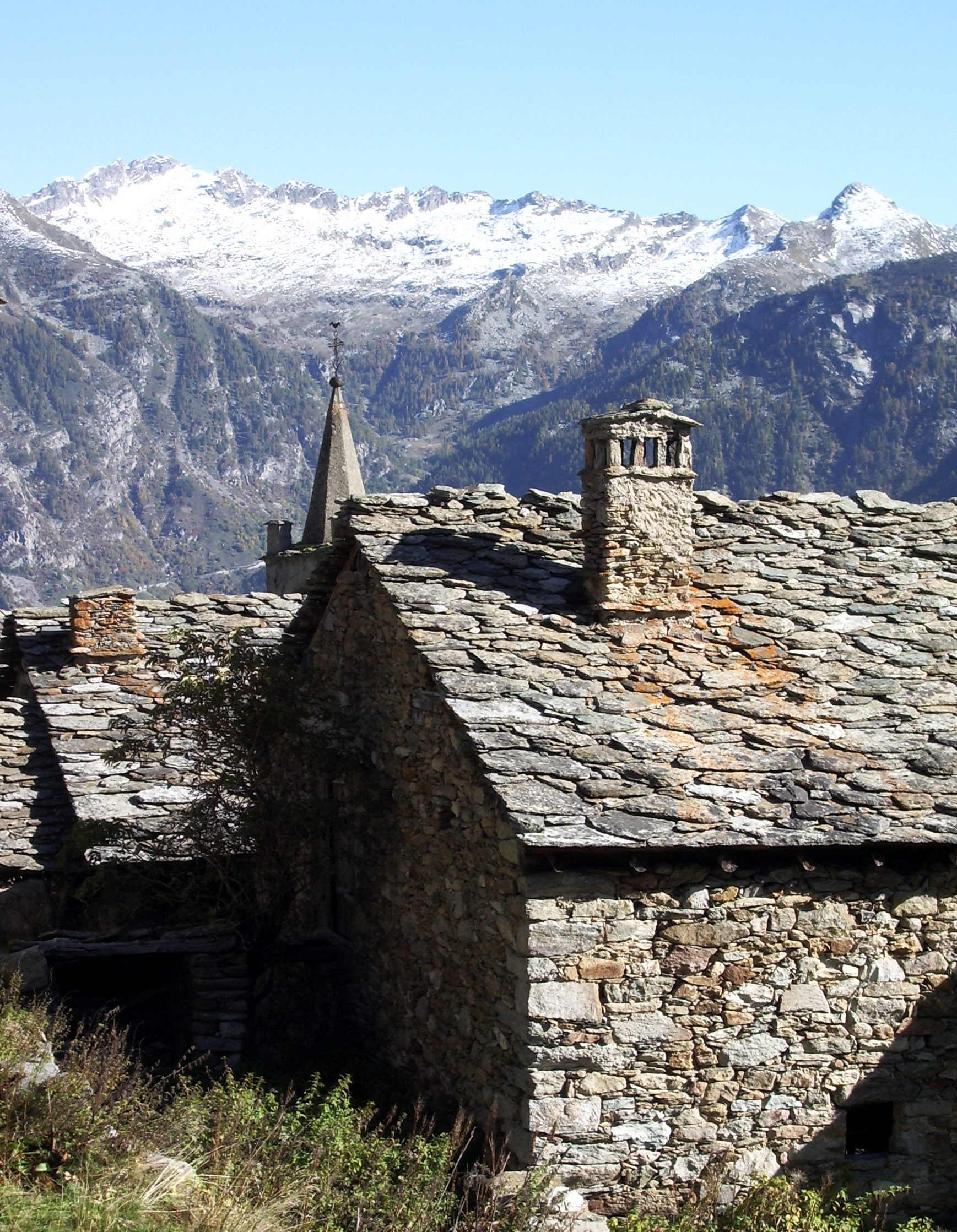 Tipiche costruzioni in pietra nel Vallone di San Grato (Valle del Lys)